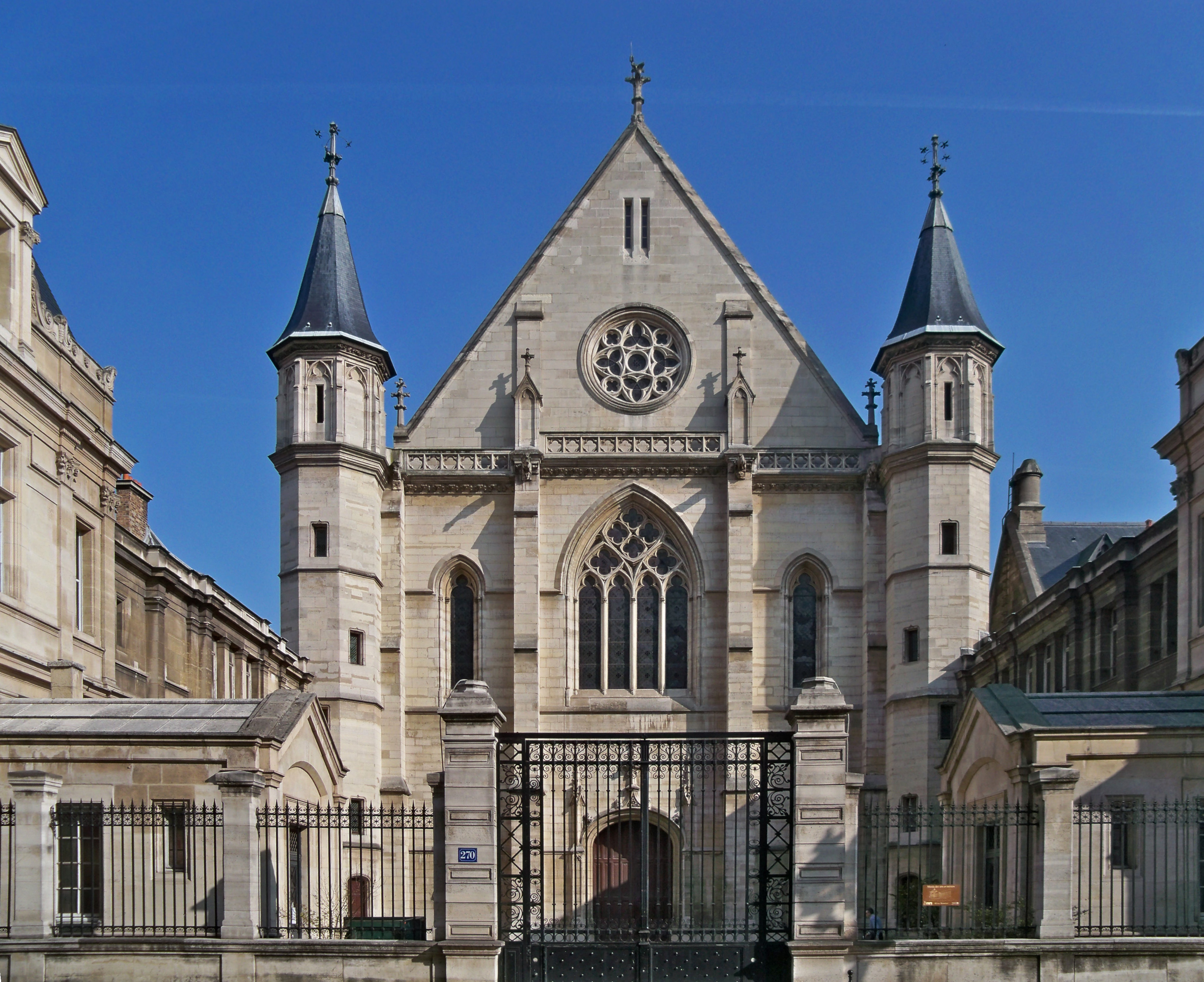 Musée des arts et métiers (ancien prieuré Saint-Martin-des-Champs) (Classé)